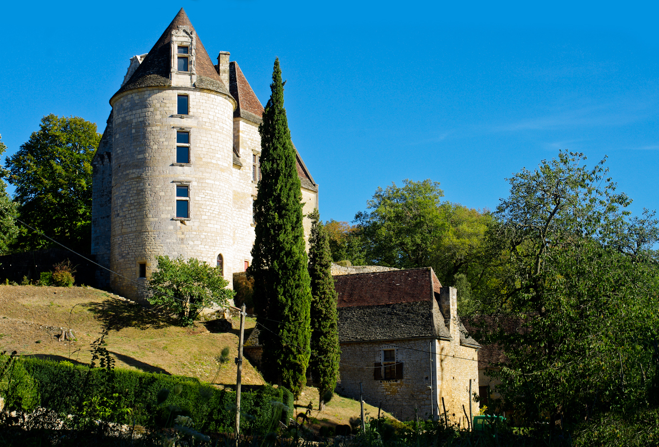 Chateau de Panassou et ses dépendances .